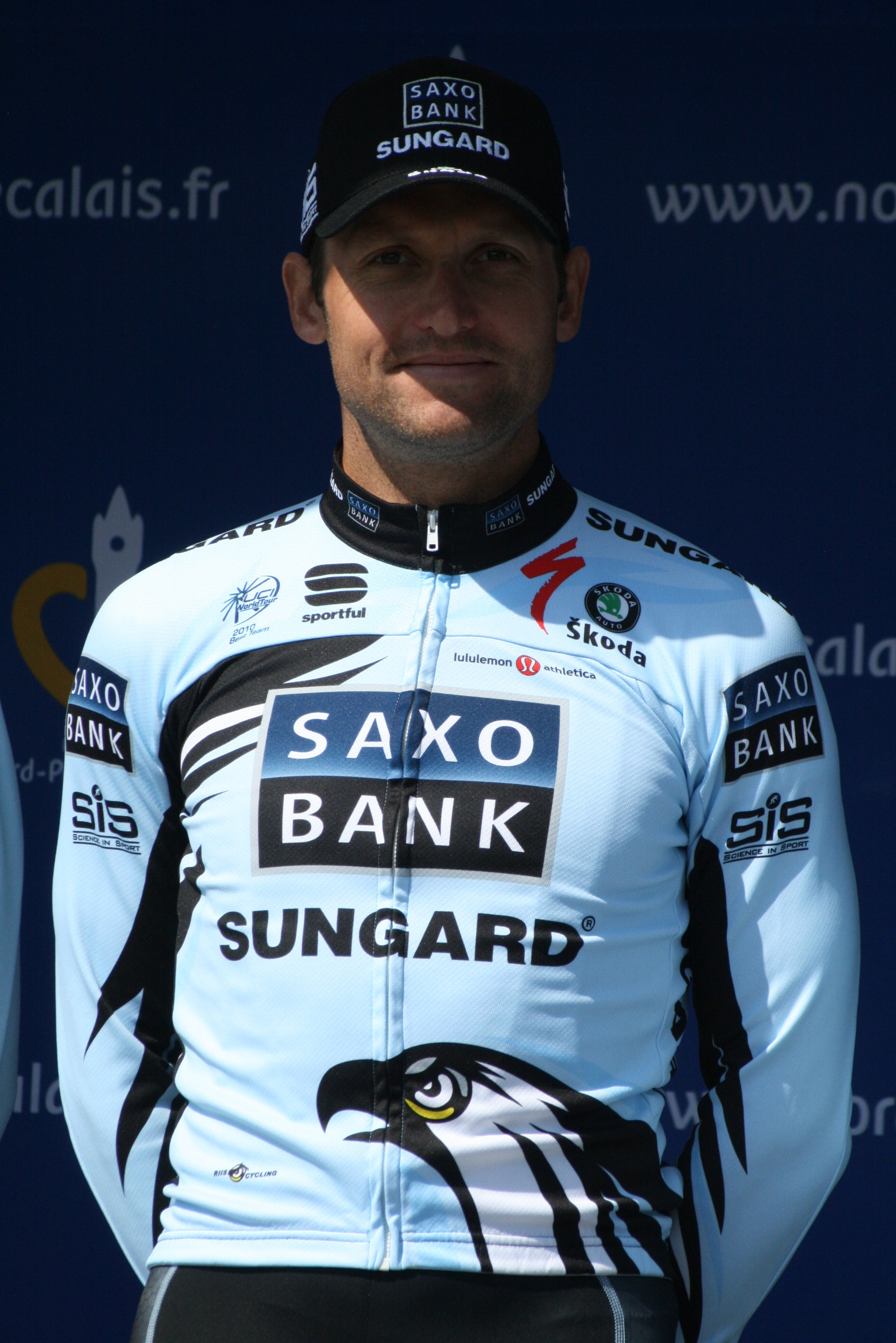 Présentation des coureurs au départ de la première étape Luke Roberts